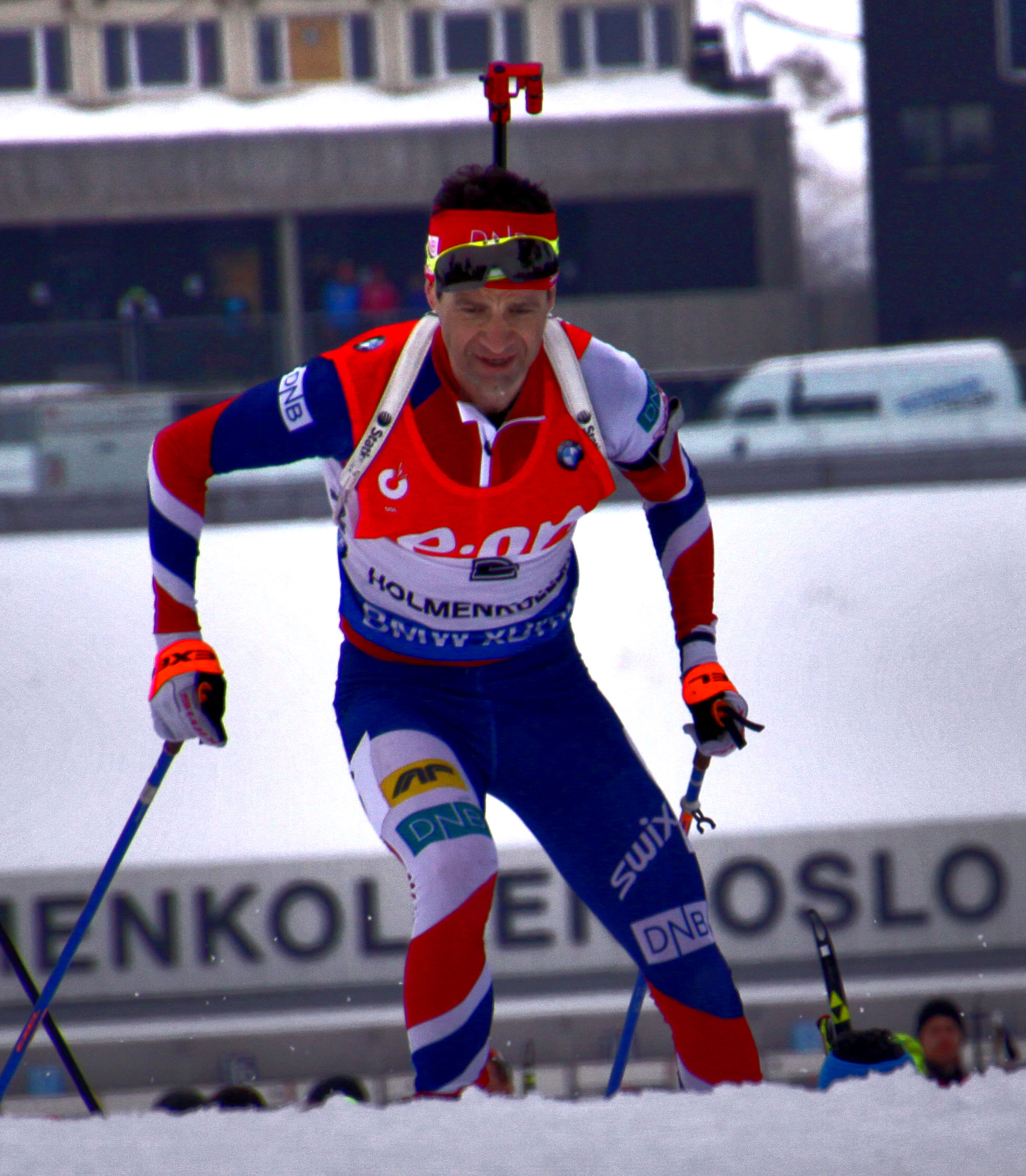 Oslo. Ole-Einar Bjoerndalen aux championnats du monde de biathlon.